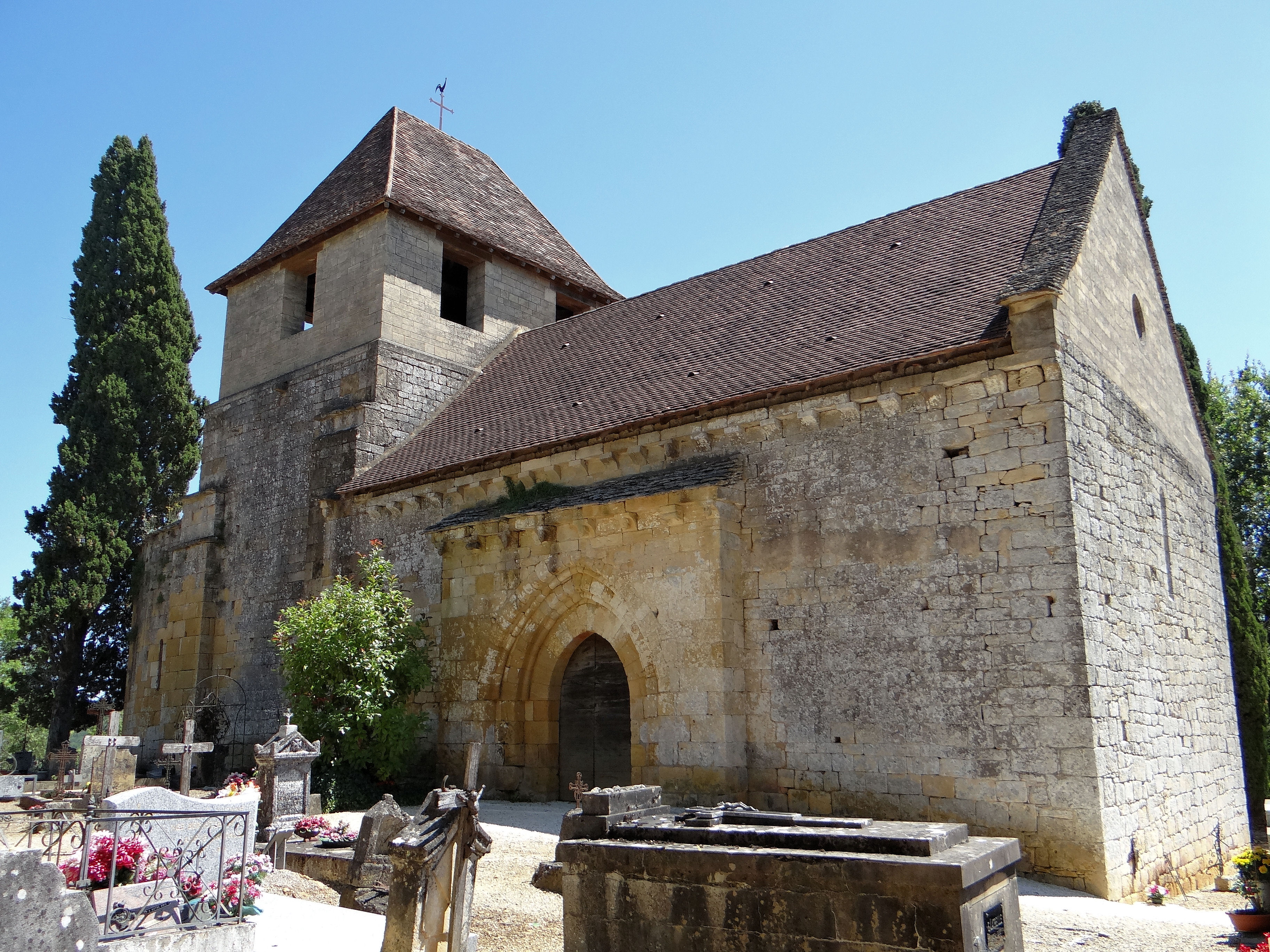 Castels - Église Saint-Martin du Vieux-Castel - Ensemble vu du nord-ouest